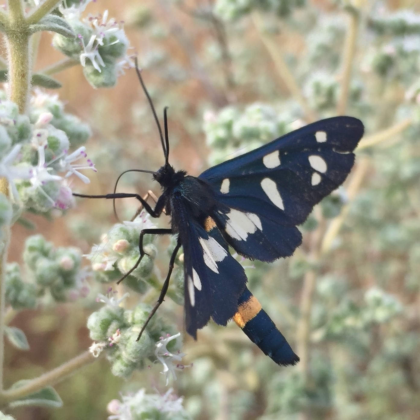 ברודן בוהק על אזוב מצוי (זעתר), כליל, מאי 2020